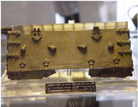 قفل رمزی یافت شده در مراغه